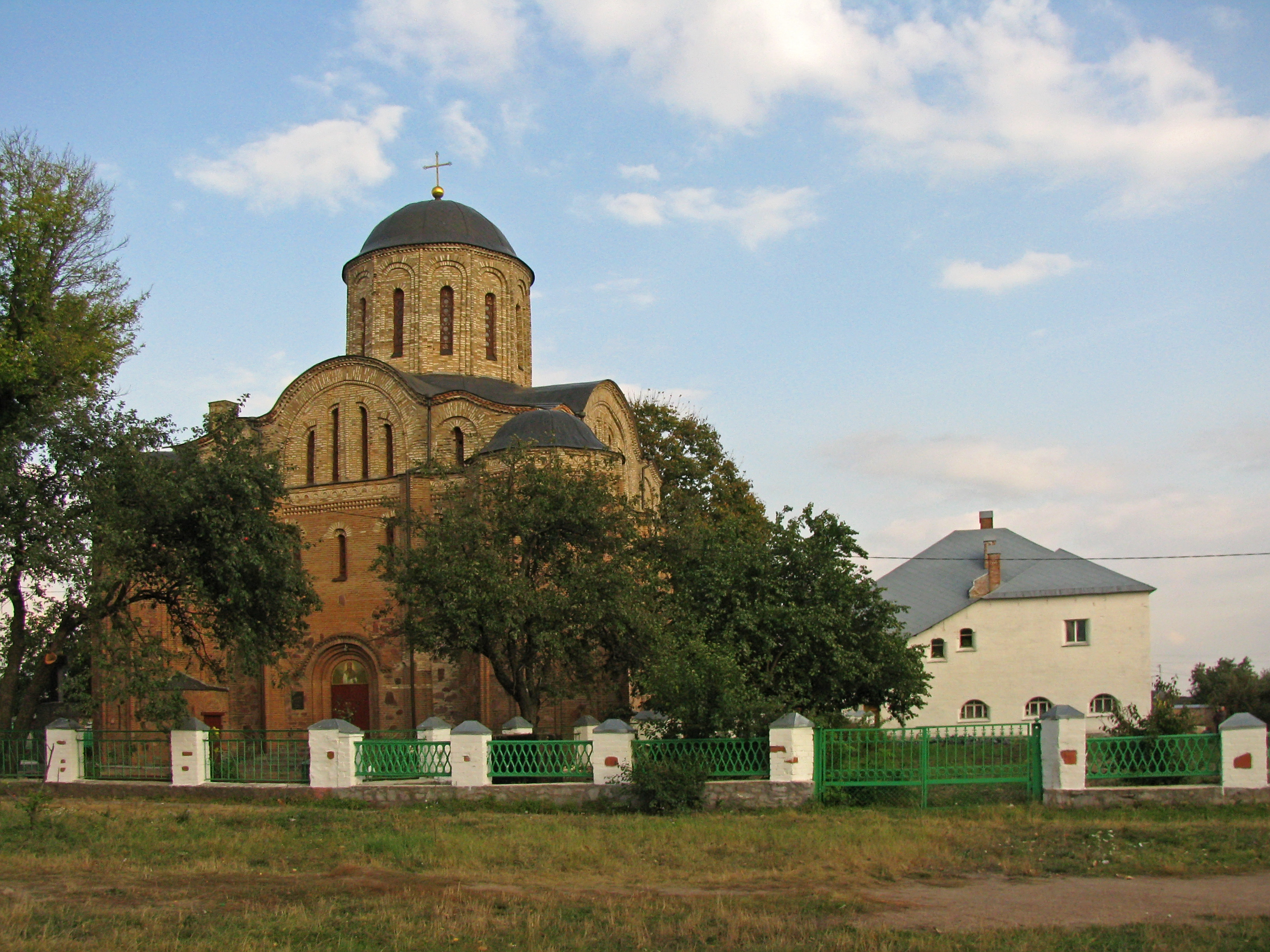 Василівська церква і монастирські споруди